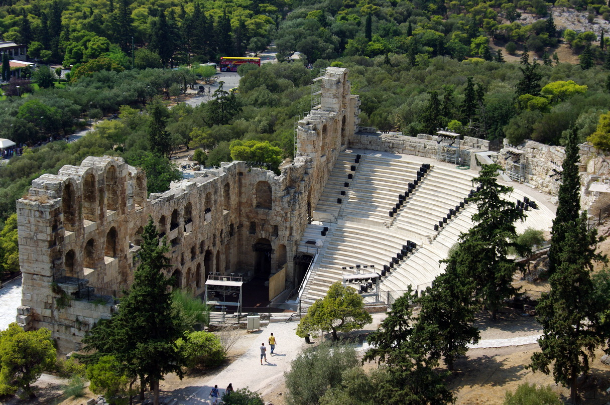 Odeon des Herodes Atticus, Akropolis